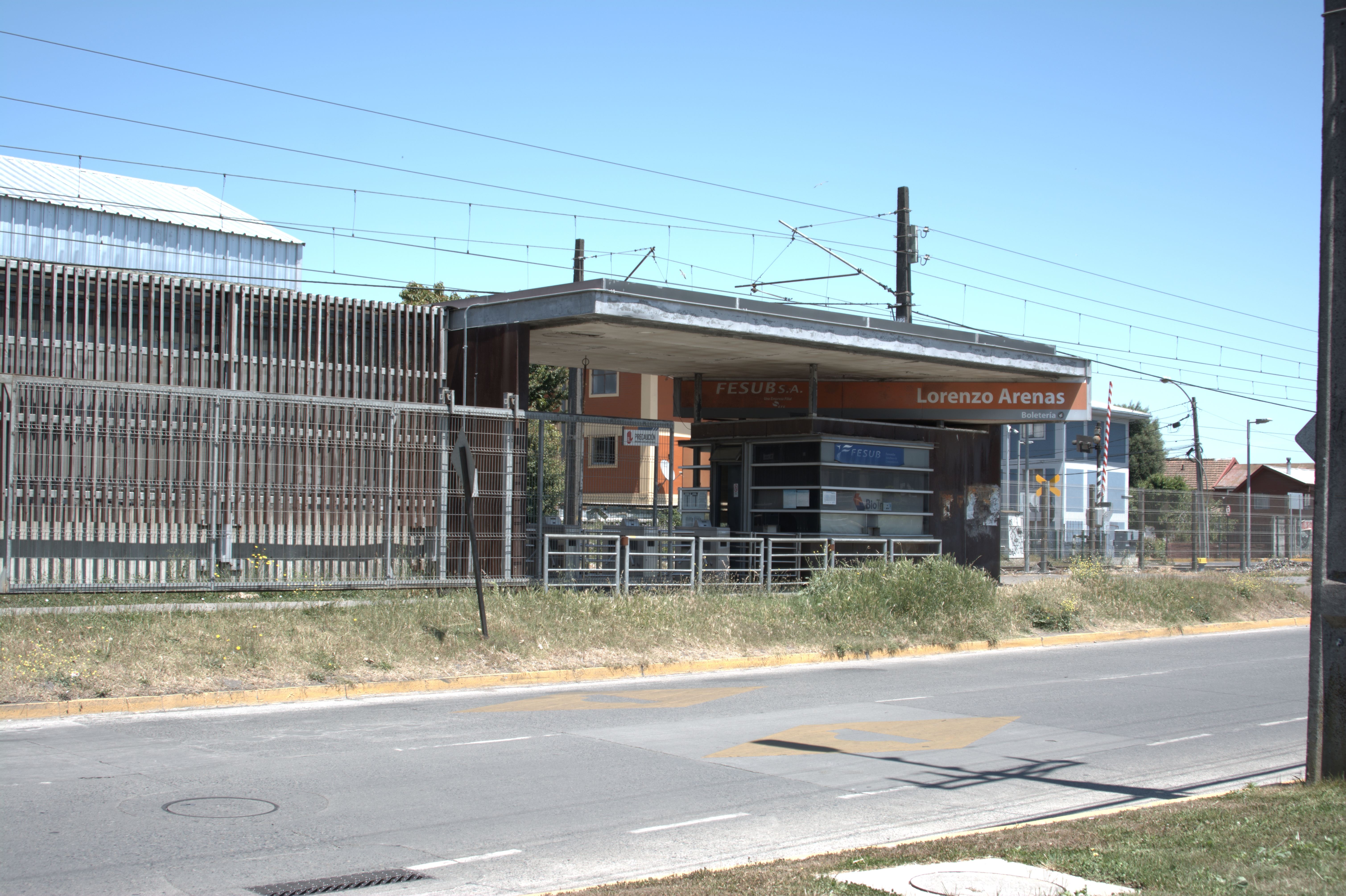 Estación Lorenzo Arenas. Concepción, diciembre de 2019